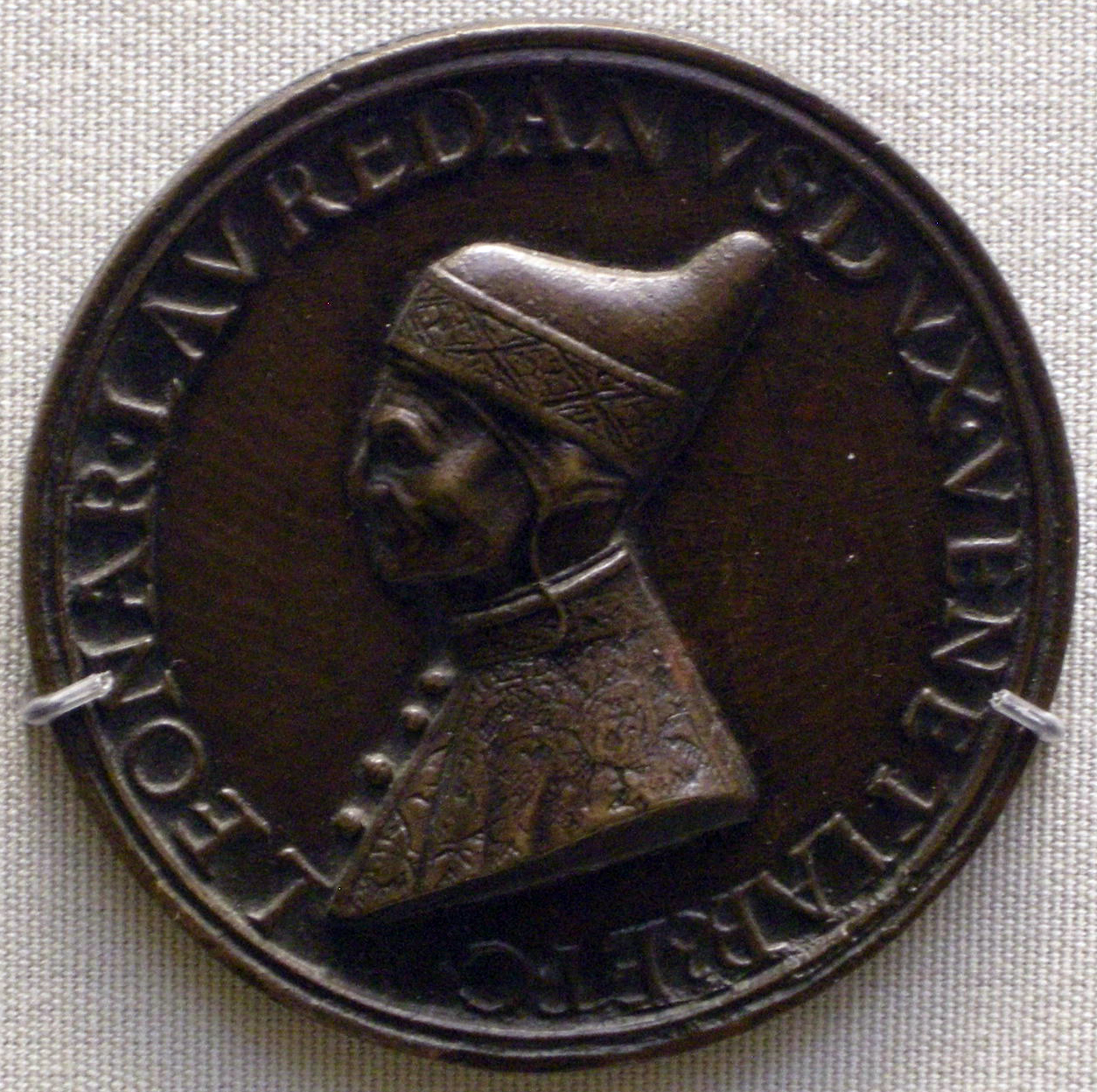 Medaglia bronzea del doge Leonardo Loredan (1436-1521)